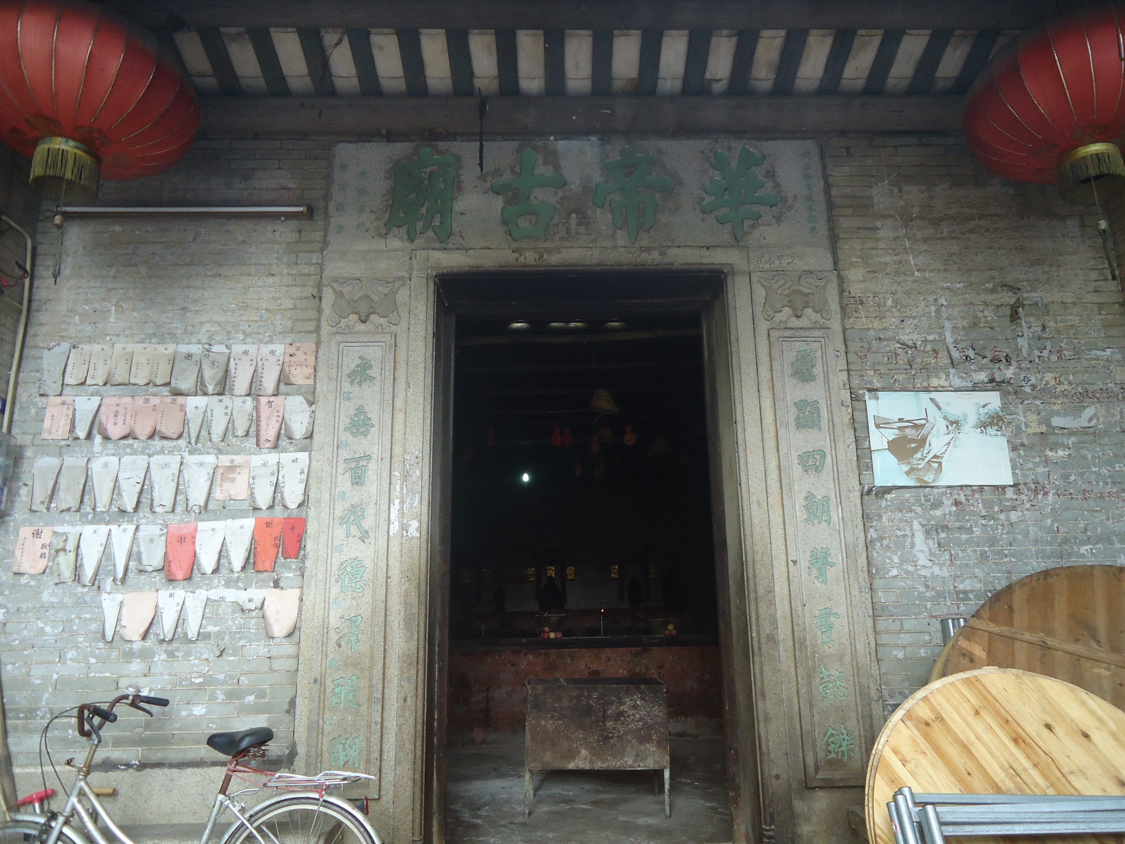 粵語: 廣州官洲島